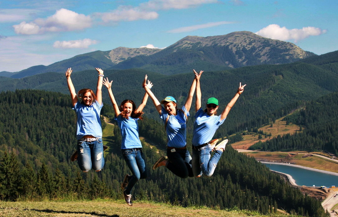 Отдыхающие лагеря на вершине г. Буковель